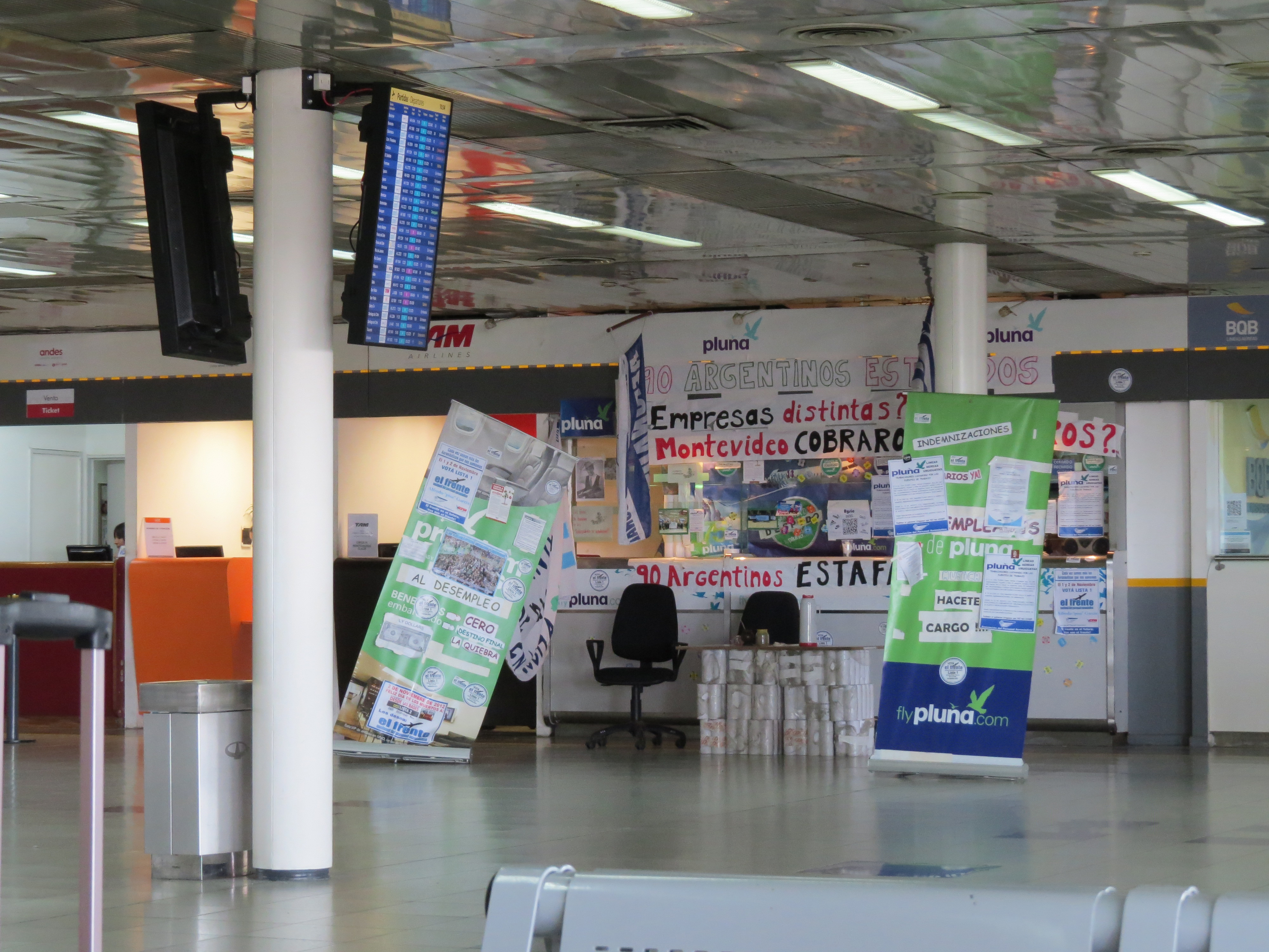 Ex oficinas de PLUNA en Aeroparque tomada por sus ex empleados